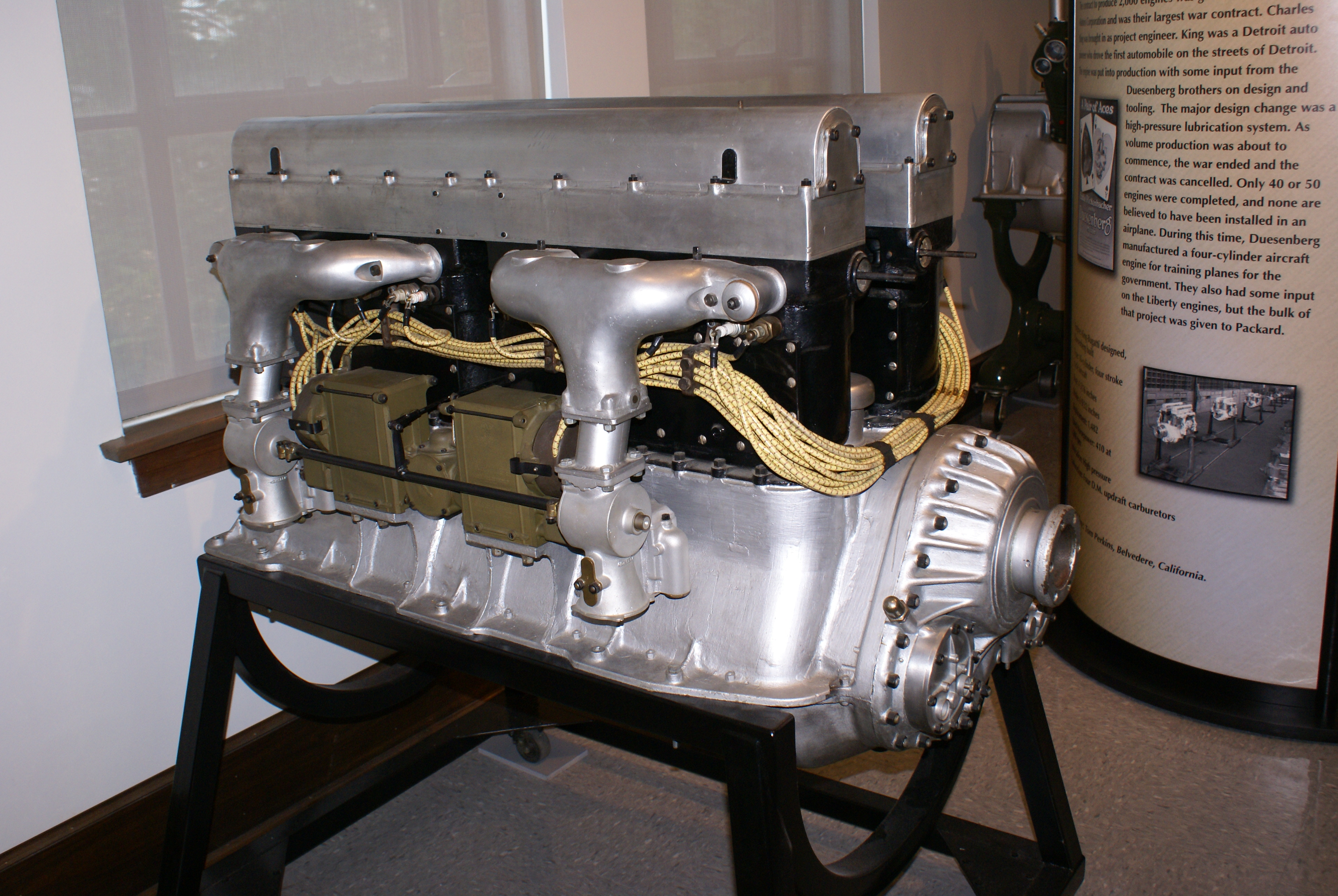 King-Bugatti U-16 aero engine